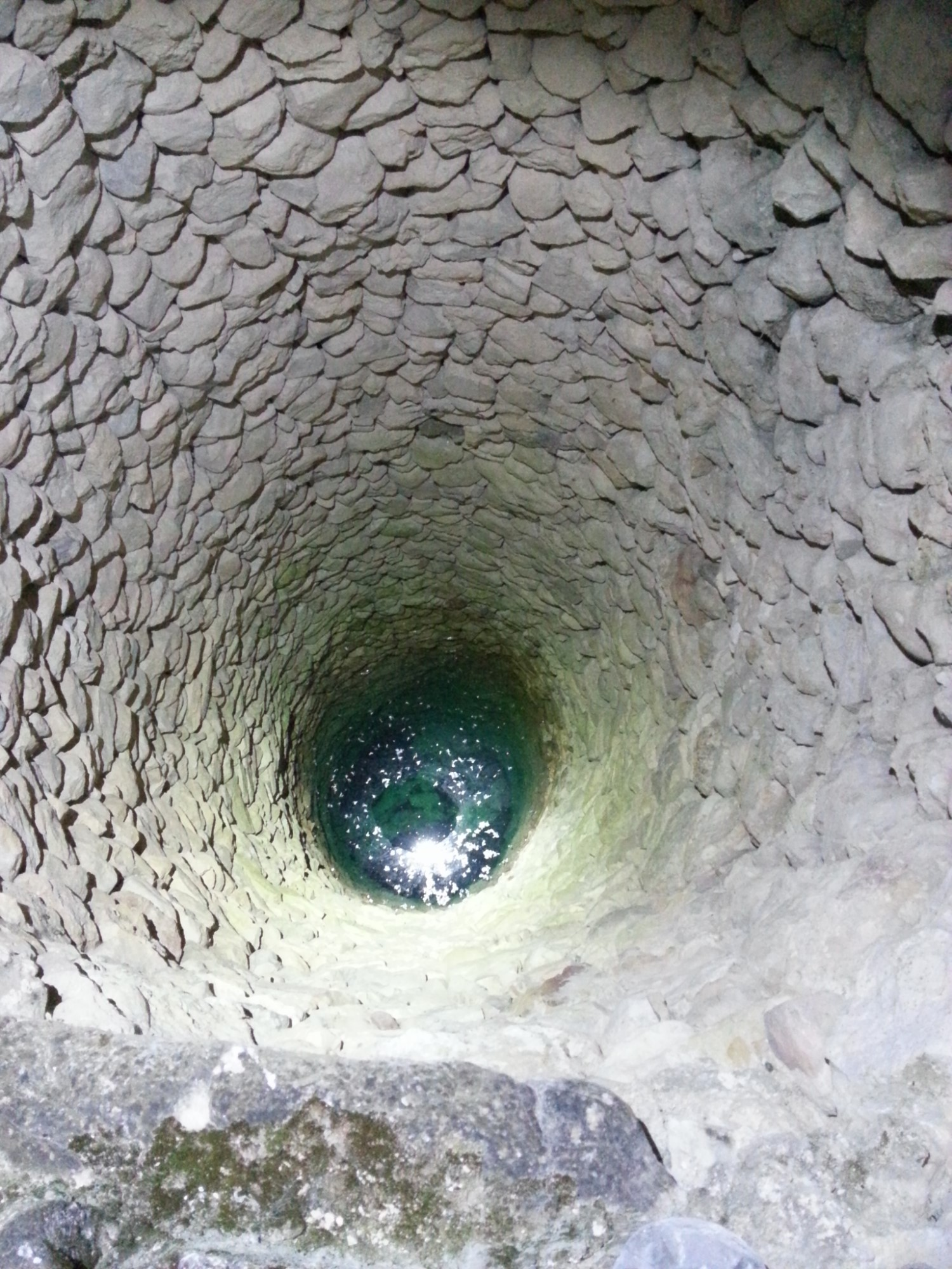 Vista del interior de un pozo árabe, junto al Castillo de la Aldehuela, Torredelcampo, provincia de Jaén, España.